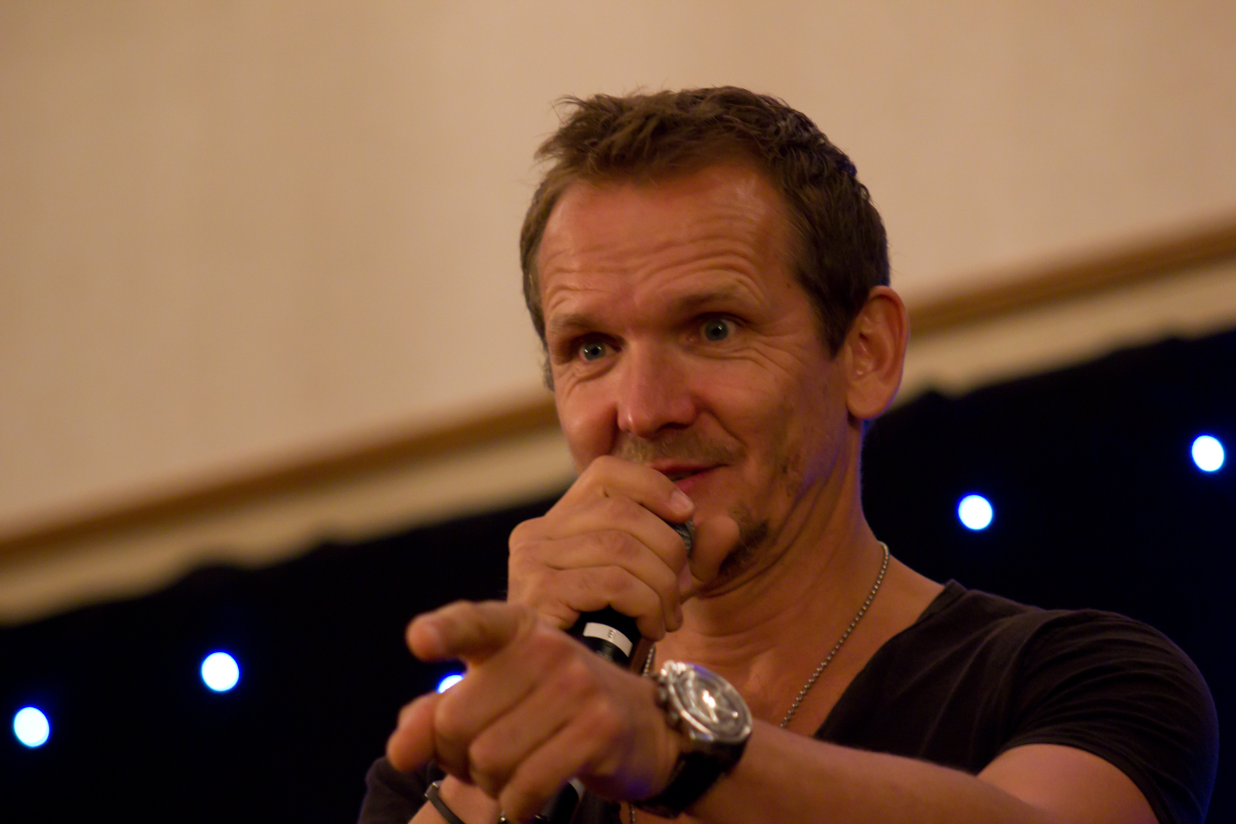 Sebastian Roché